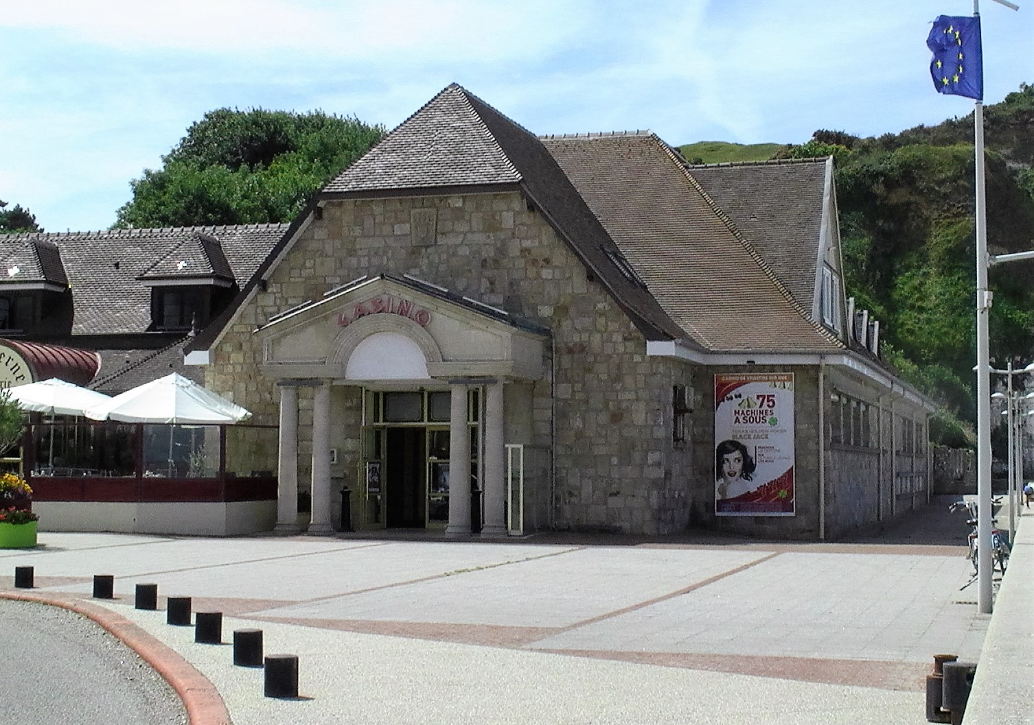 Le casino - vue rapprochée.